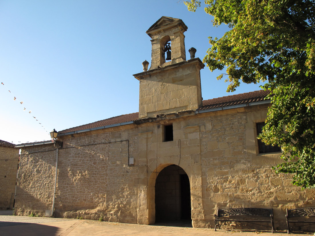 Iglesia de San Esteban en la localidad de Salcedo (Álava, España)